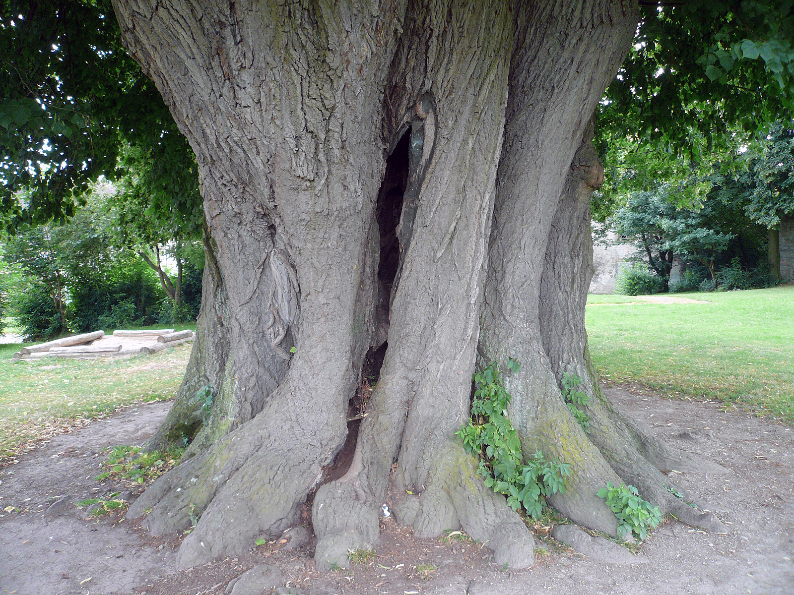 Apostellinde Gehrden